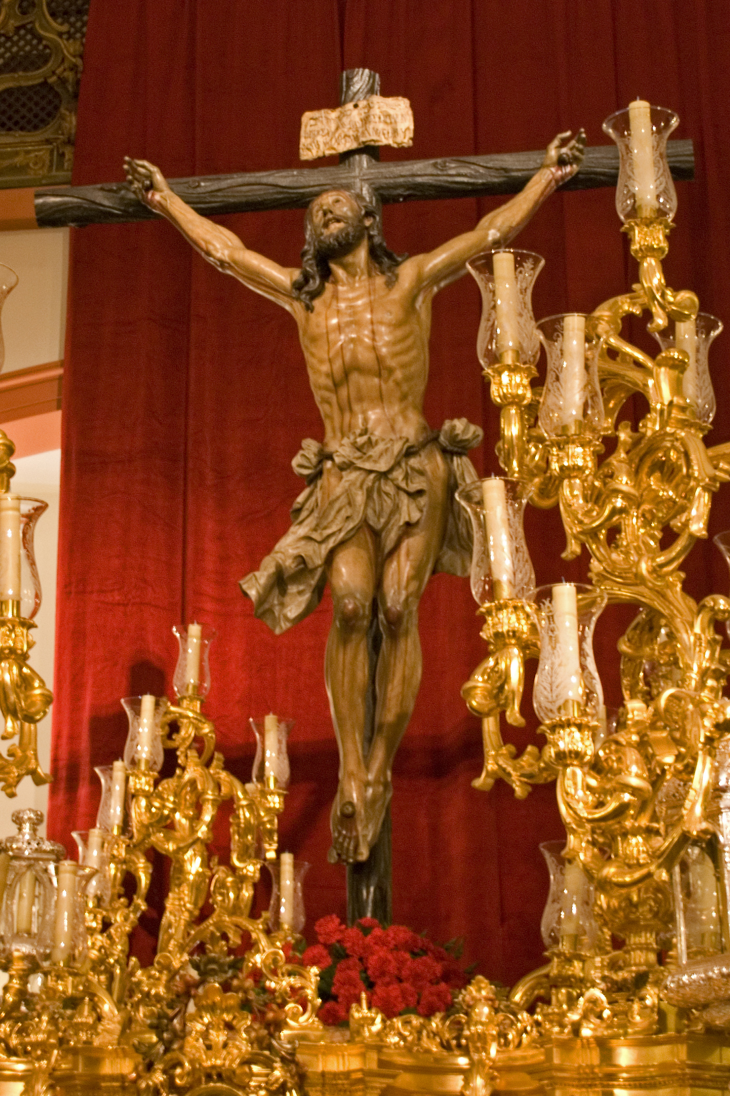 Cristo de la Expiración, (El Cachorro), Sevilla